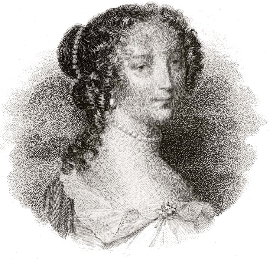 Françoise d'Aubigné, marquise de Maintenon, épouse secrète du roi de France Louis XIV.